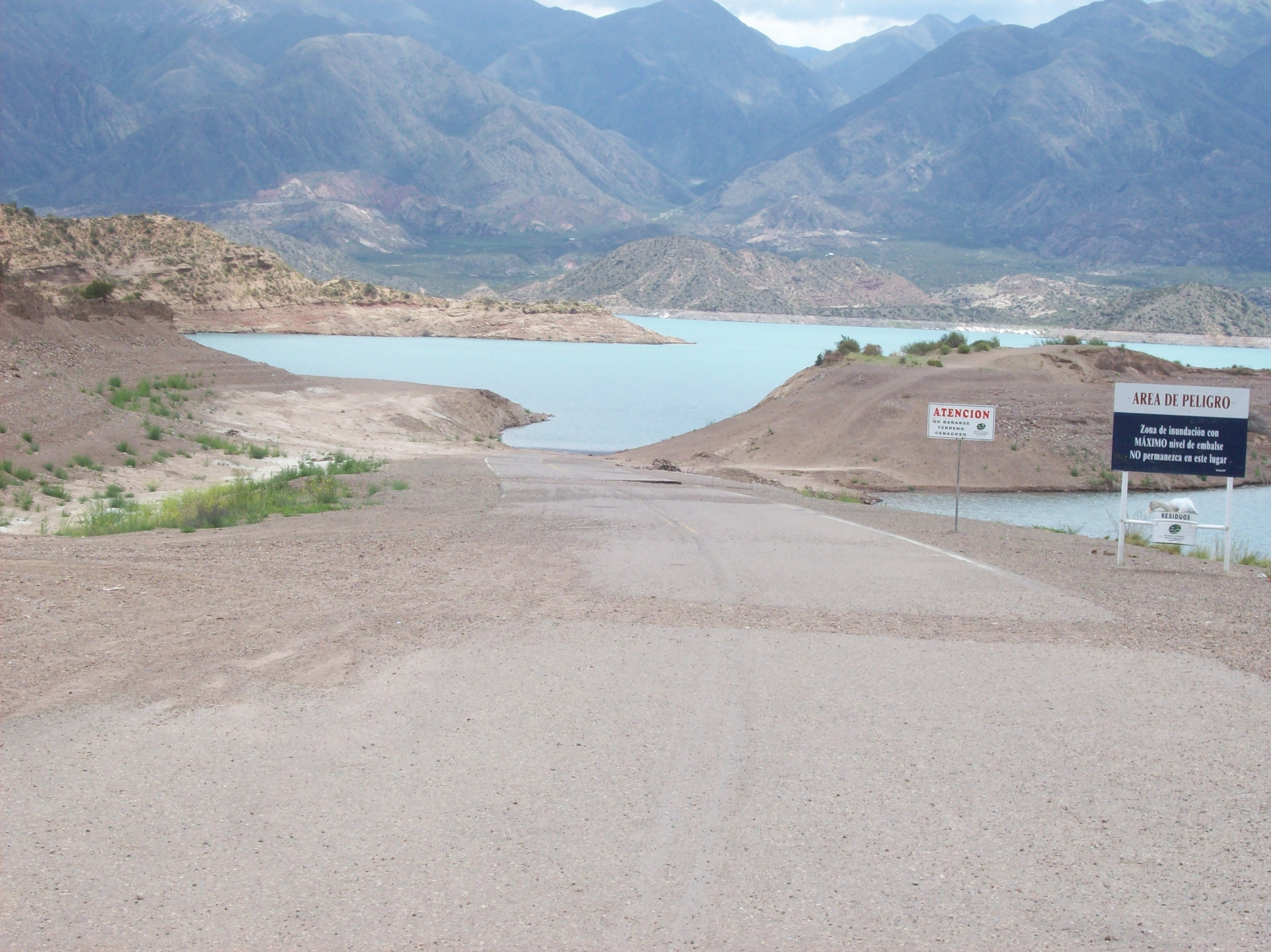 Antigua traza de la Ruta Nacional 7 inundada por la construcción del Embalse Potrerillos en el Departamento Luján de Cuyo, Provincia de Mendoza, Argentina.